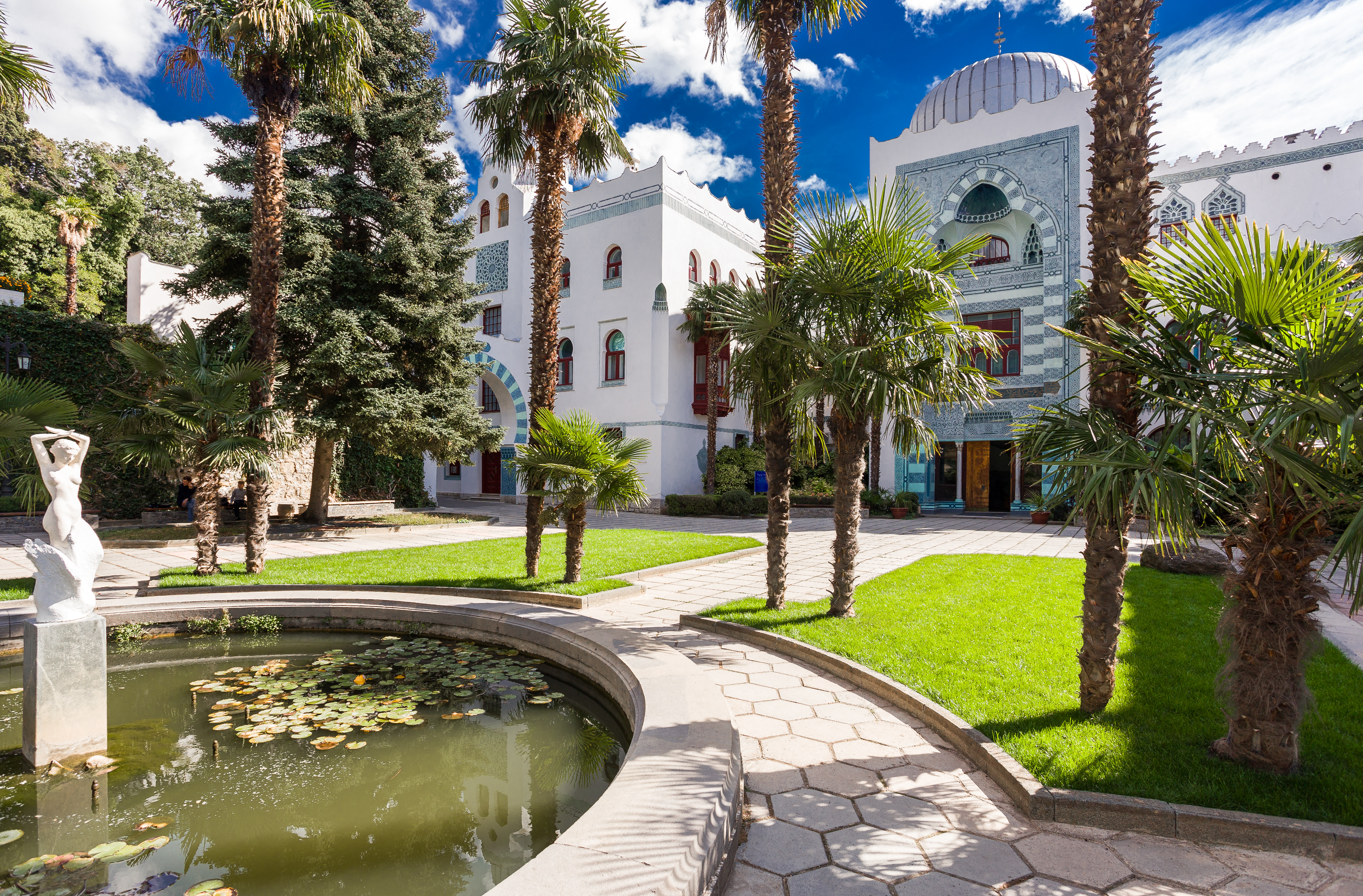 Палацовий комплекс «Дюльбер» Кореїз вул. Алупкінське шосе, 1, СК «Дюльбер»